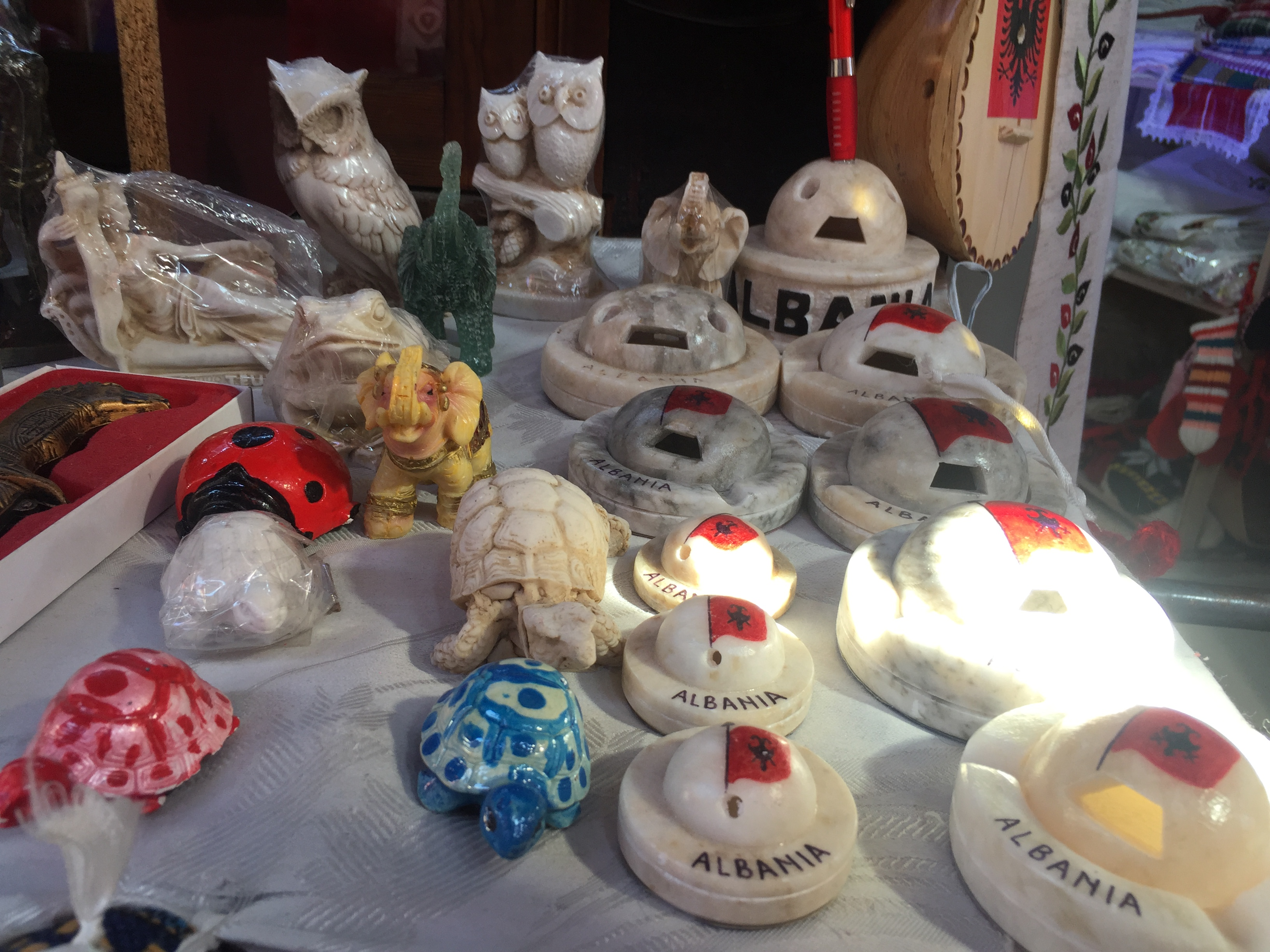 Suvenire në Krujë